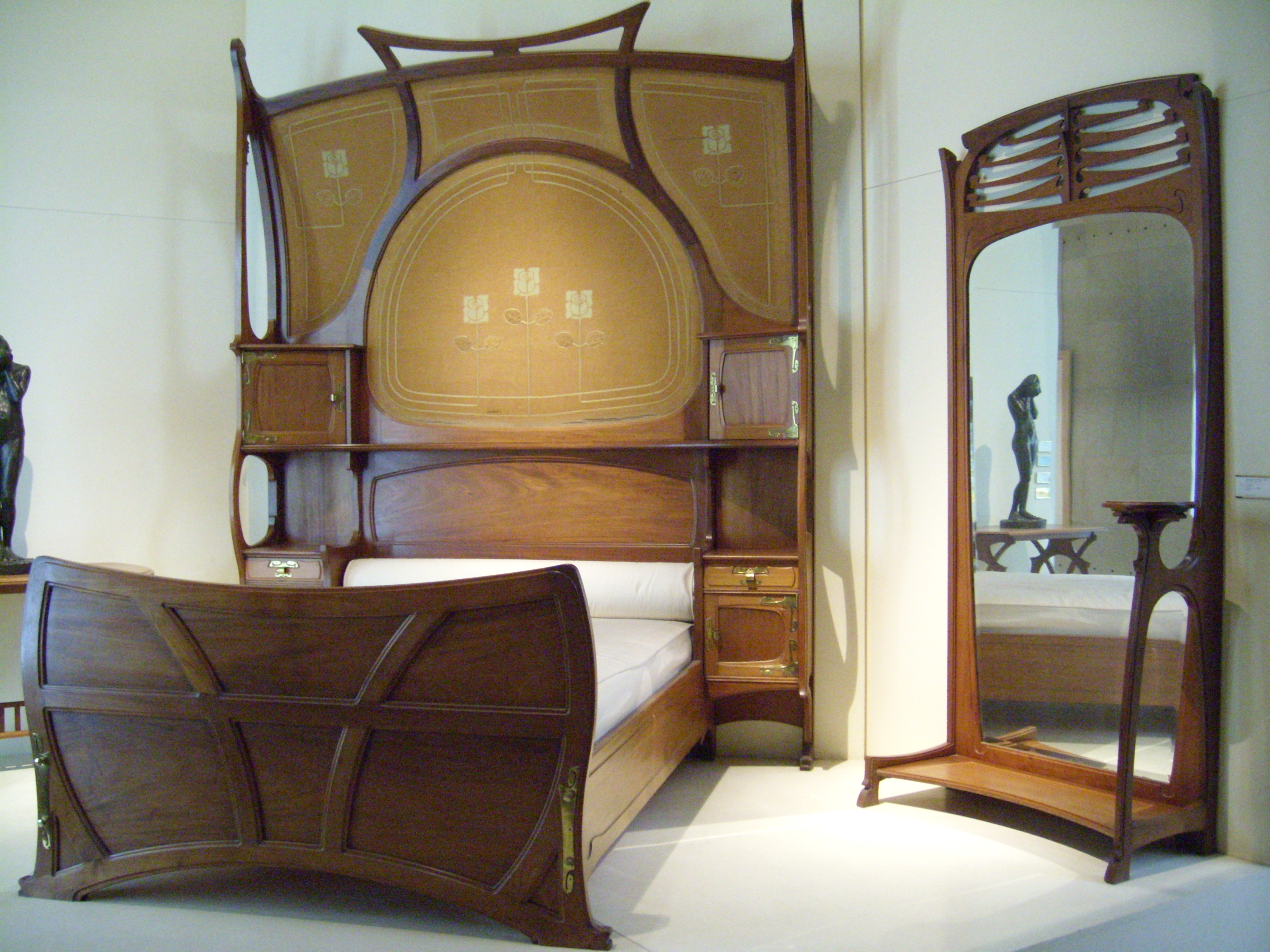 Gustave Serrurier-Bovy, psyché et lit en acajou (1899), Musée d'Orsay, Paris. Reflet d'une table d'acajou de Serrurier-Bovy (1899).